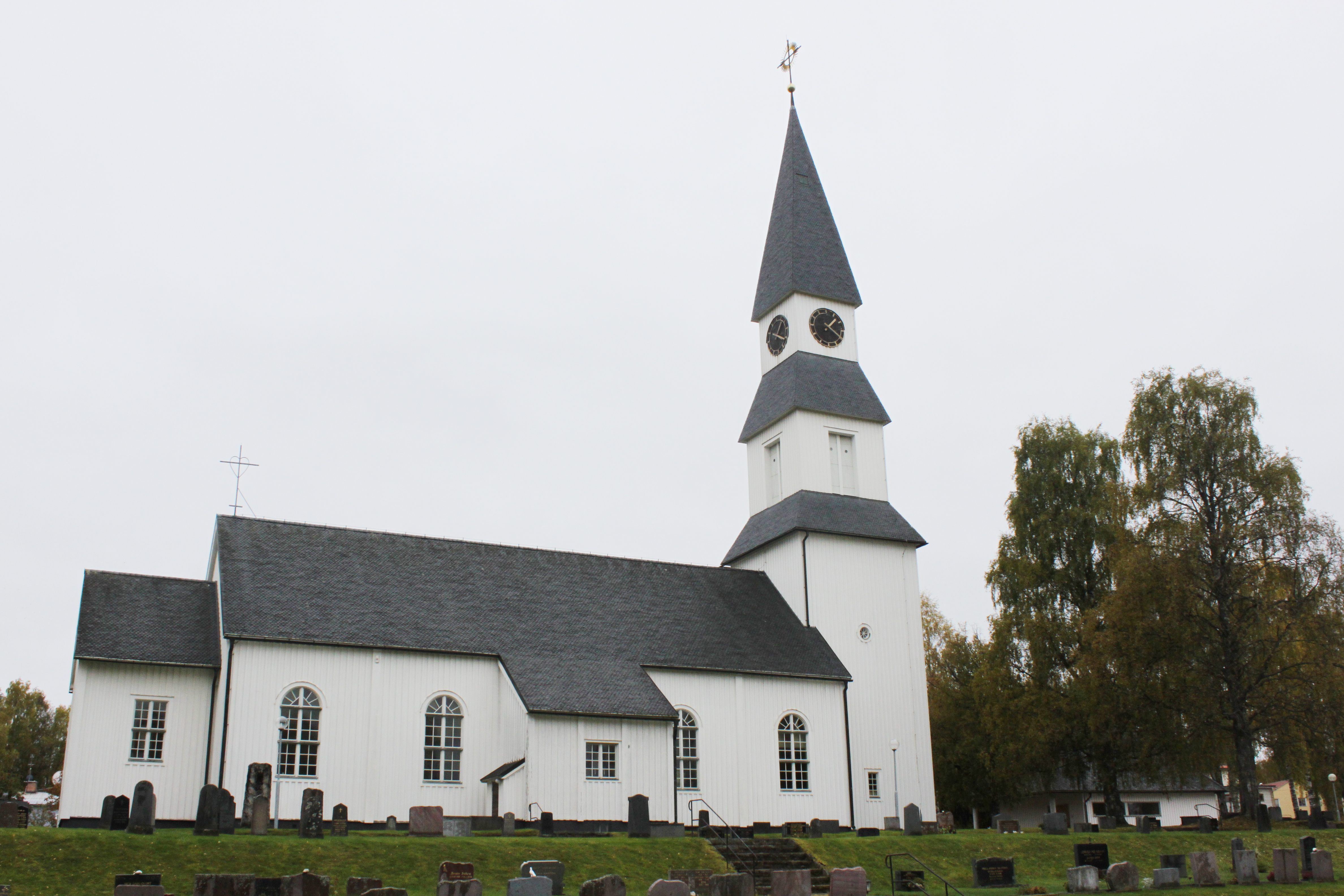 Särna kyrka (Särnabyn 3:26). Älvdalens kommun. Dalarna.